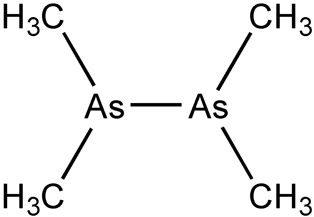 truktur von Kakodyl